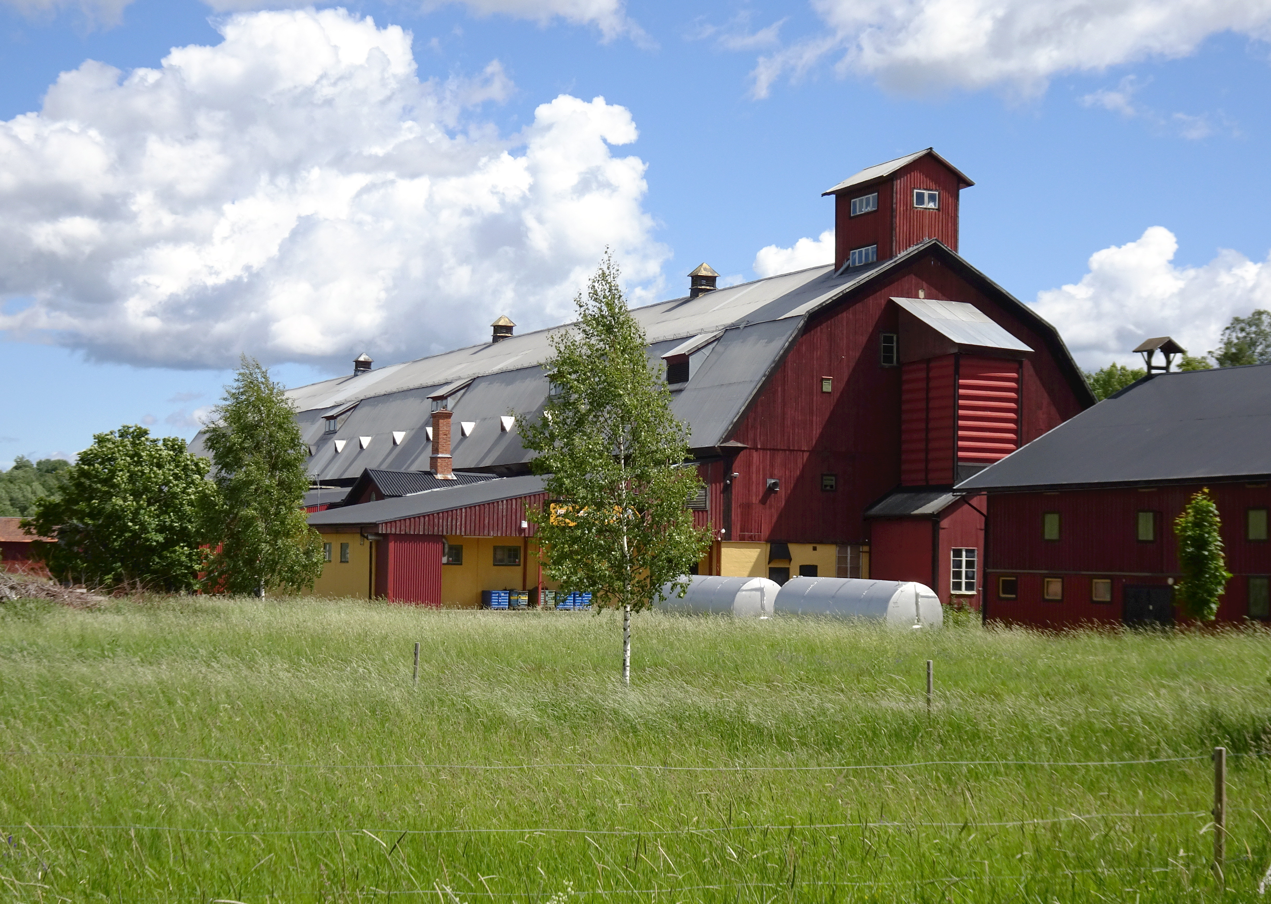 Tvetabergs säteri, ekonomibyggnad